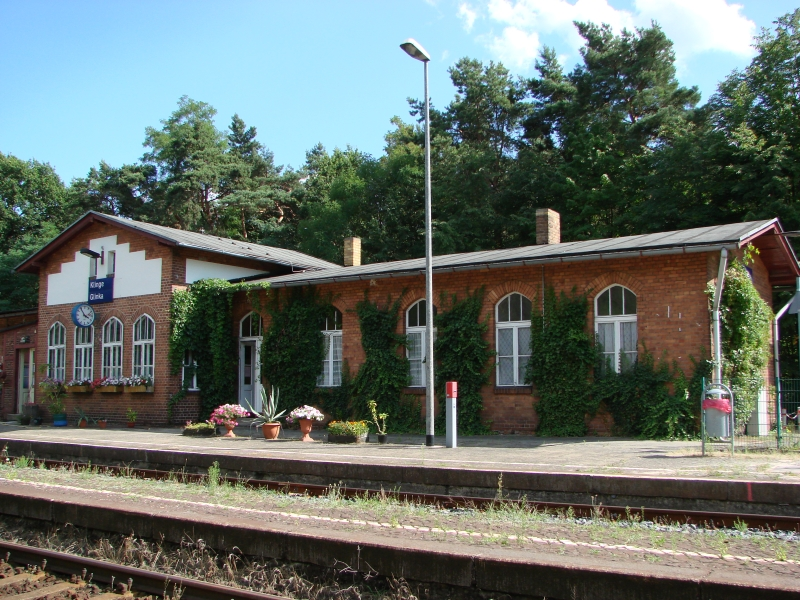 Bahnhof Klinge 2010, Gemeinde Wiesengrund, Kreis Spree-Neiße, Brandenburg, Deutschland